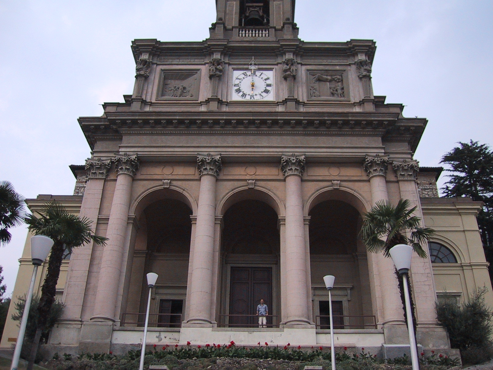 Aufnahme 26. Juli 2005, Fassade der Pfarrkirche in Mendrisio, Kanton Tessin, Schweiz. Fotograf Peter Berger (selbst fotografiert). Lizenzstatus "GNU-FDL"